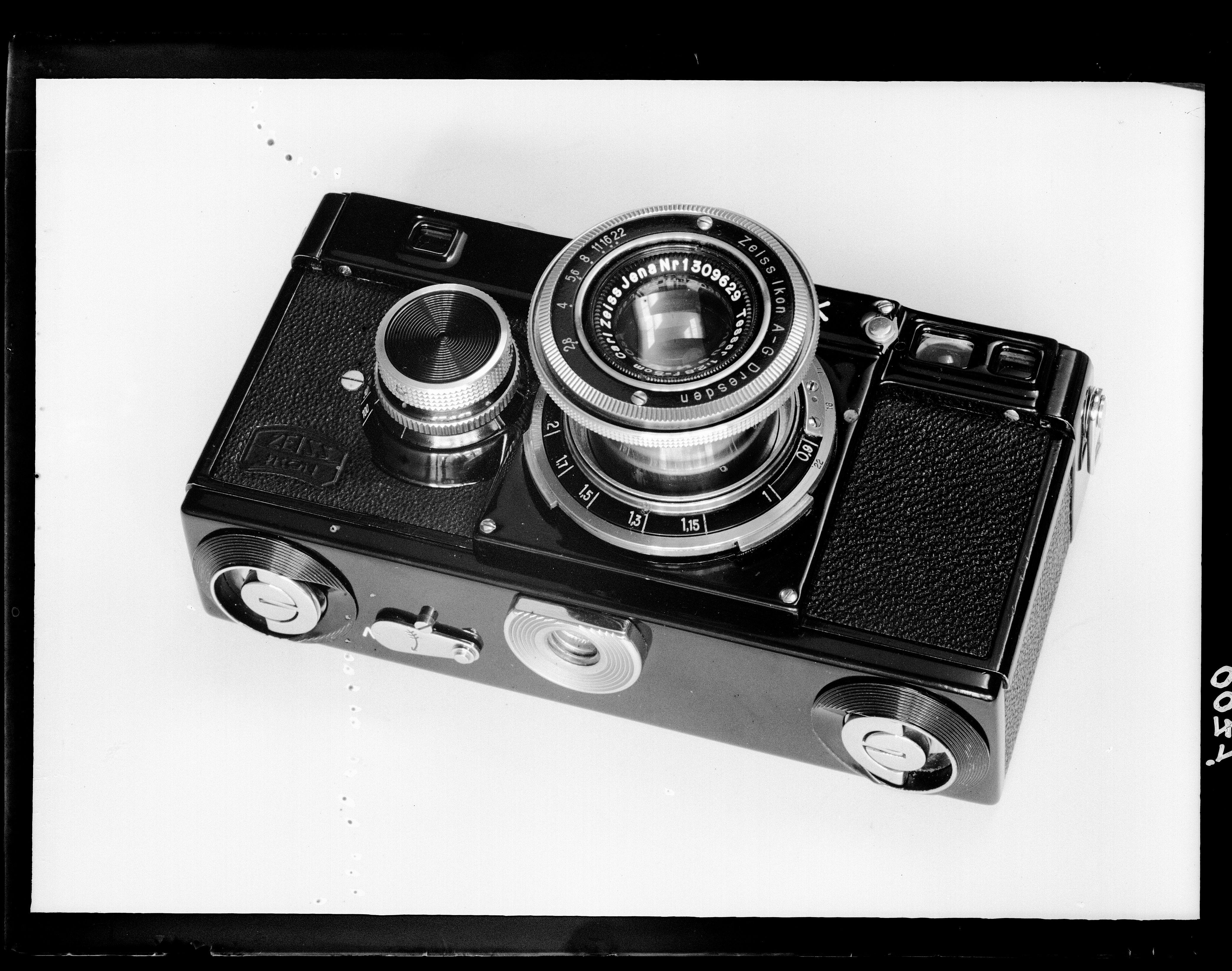 Beschrijving Camera Documenttype foto Vervaardiger Guermonprez, Paul Collectie Collectie Paul Guermonprez Datering 1934 t/m 1937 Inventarissen Afbeeldingsbestand 010016000043 Generated with Dememorixer